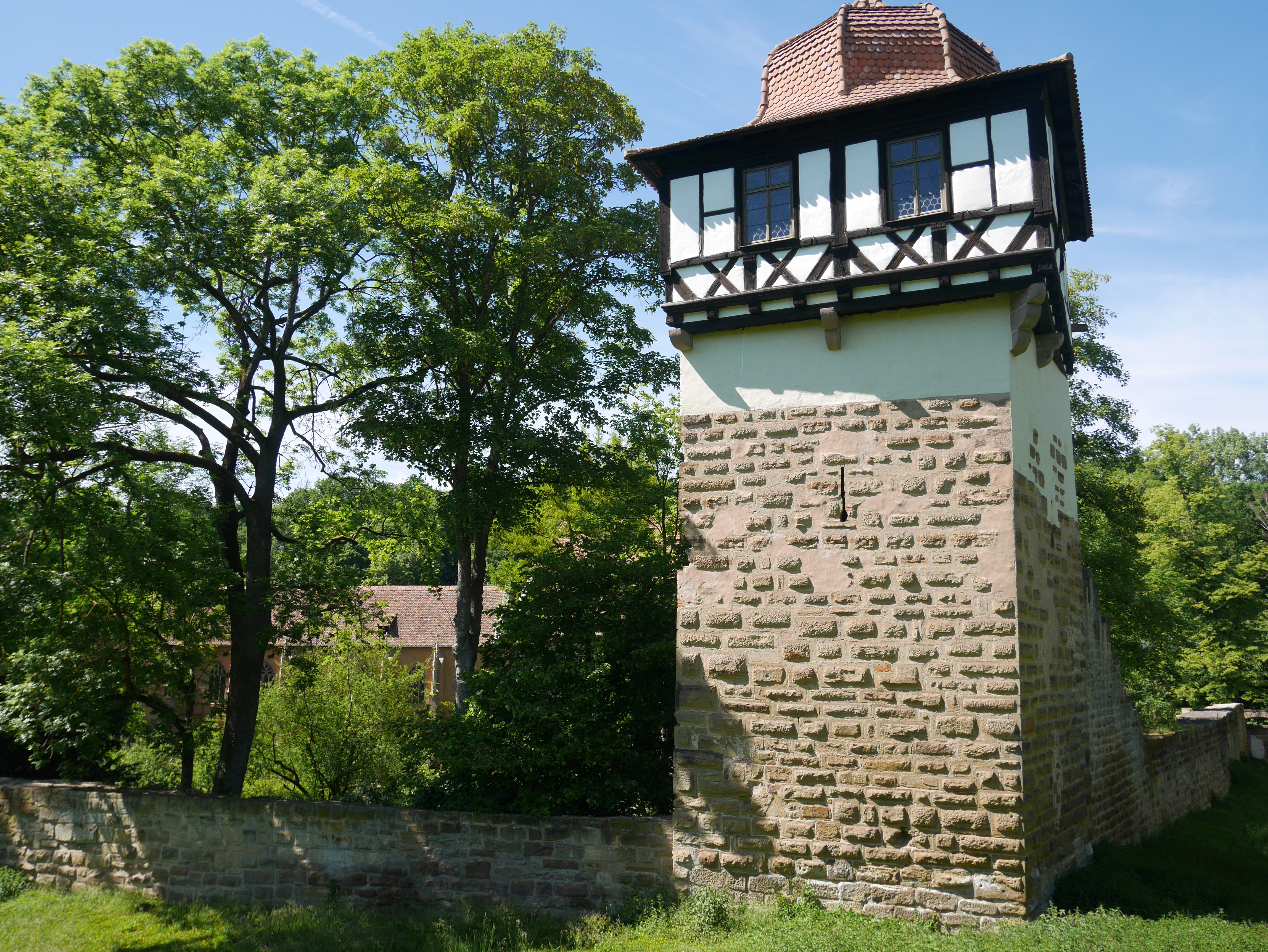 Faustturm (Maulbronn Monastery) Süd